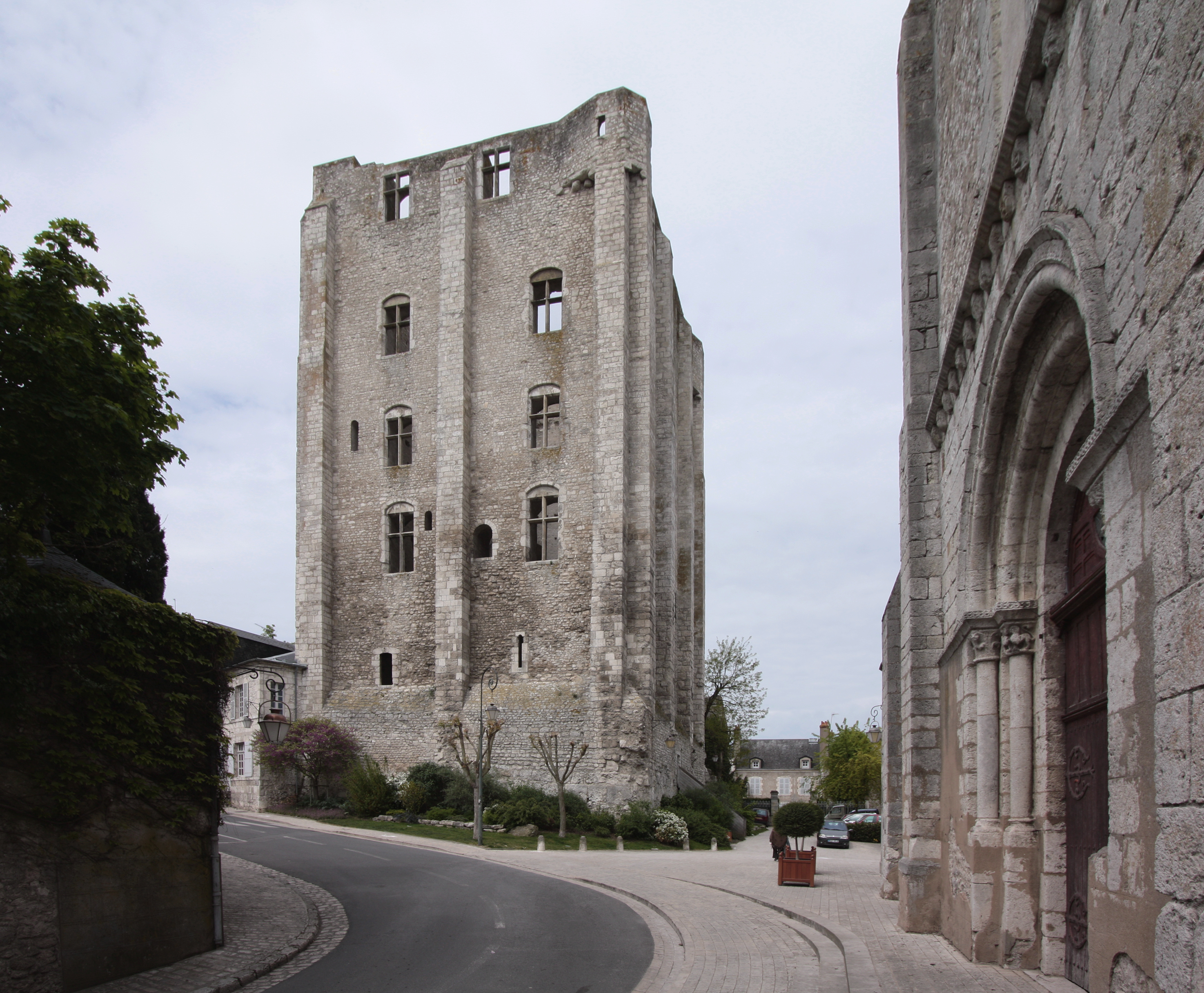 Beaugency, Ortschaft im Département Loiret/Frankreich - Blick von der Kirche Notre-Dame auf den mächtigen Donjon, auch "Tour de César" genannt, aus dem 11. Jahrhundert.